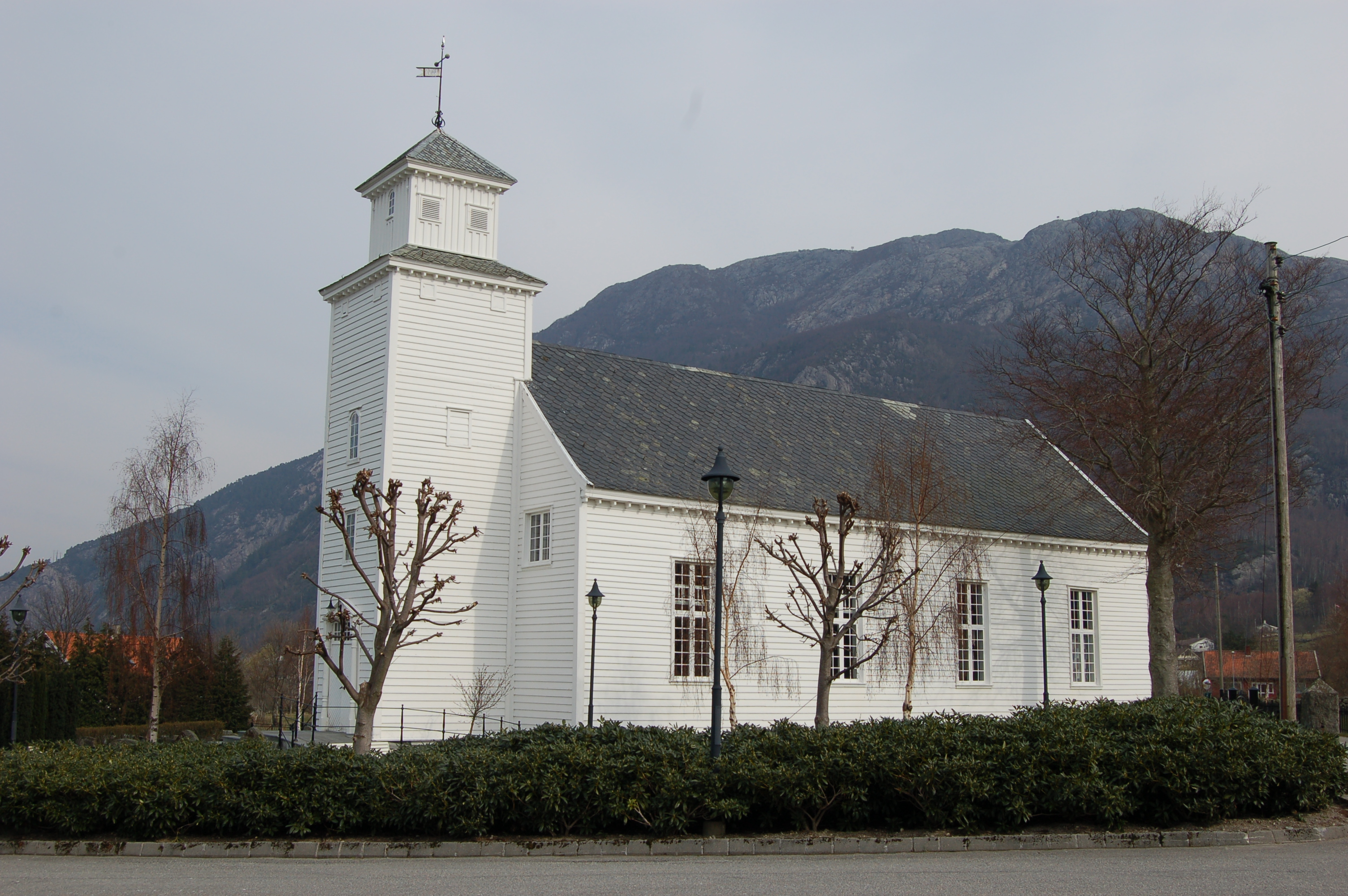 Forsand kyrkje, Forsand, Norway